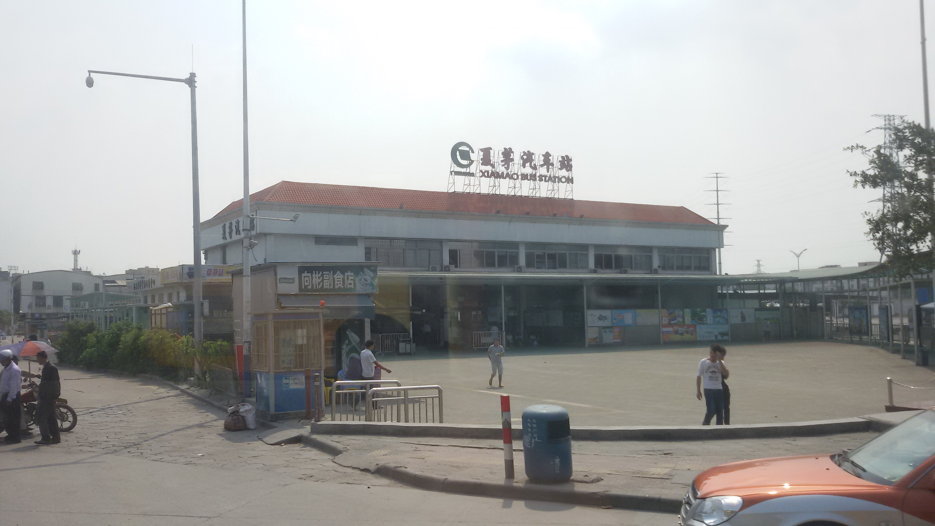 粵語: 夏茅客运站